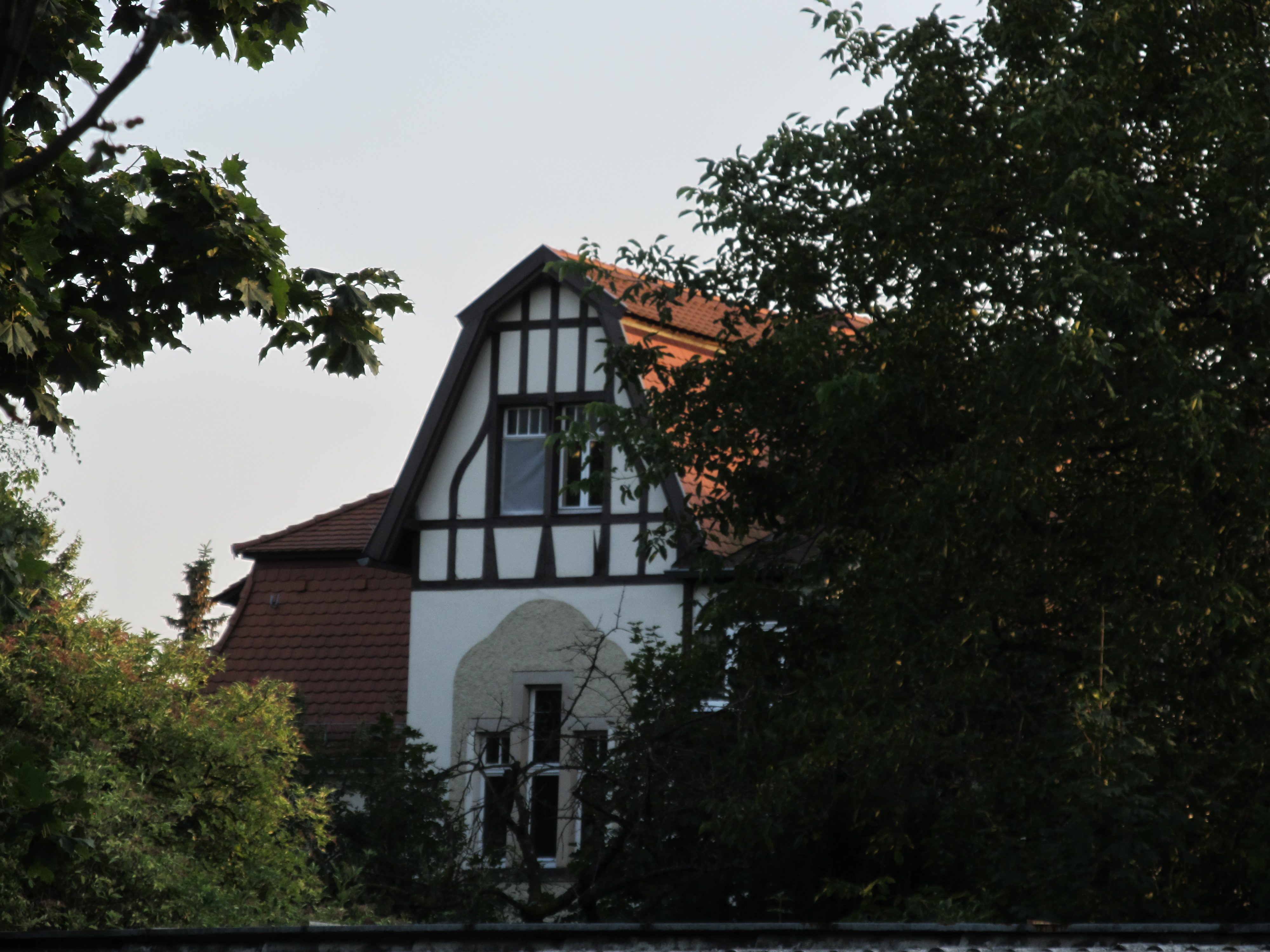 Fassadendetail der Mietvilla Roseggerstraße 8, Radebeul